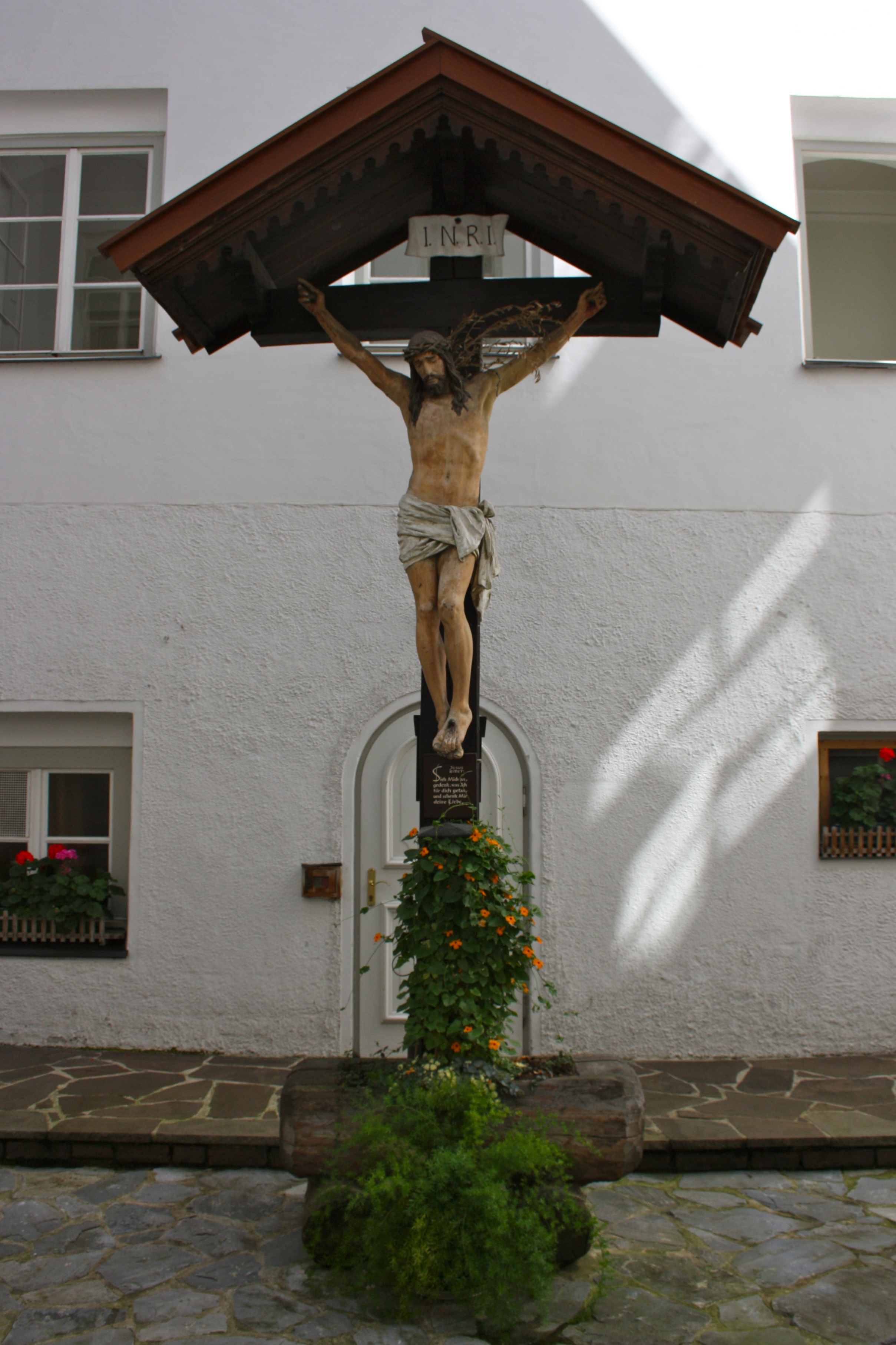 Kruzifix im Innenhof der Bubenburg (Fügener Schloss) in Fügen (Zillertal). This media shows the remarkable cultural object in the Austrian state of Tyrol listed by the Tyrolean Art Cadastre with the ID 14006. (on tirisMaps, pdf, more images on Commons)